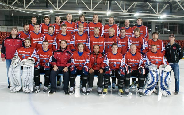 Компаньйон-Нафтогаз-команда